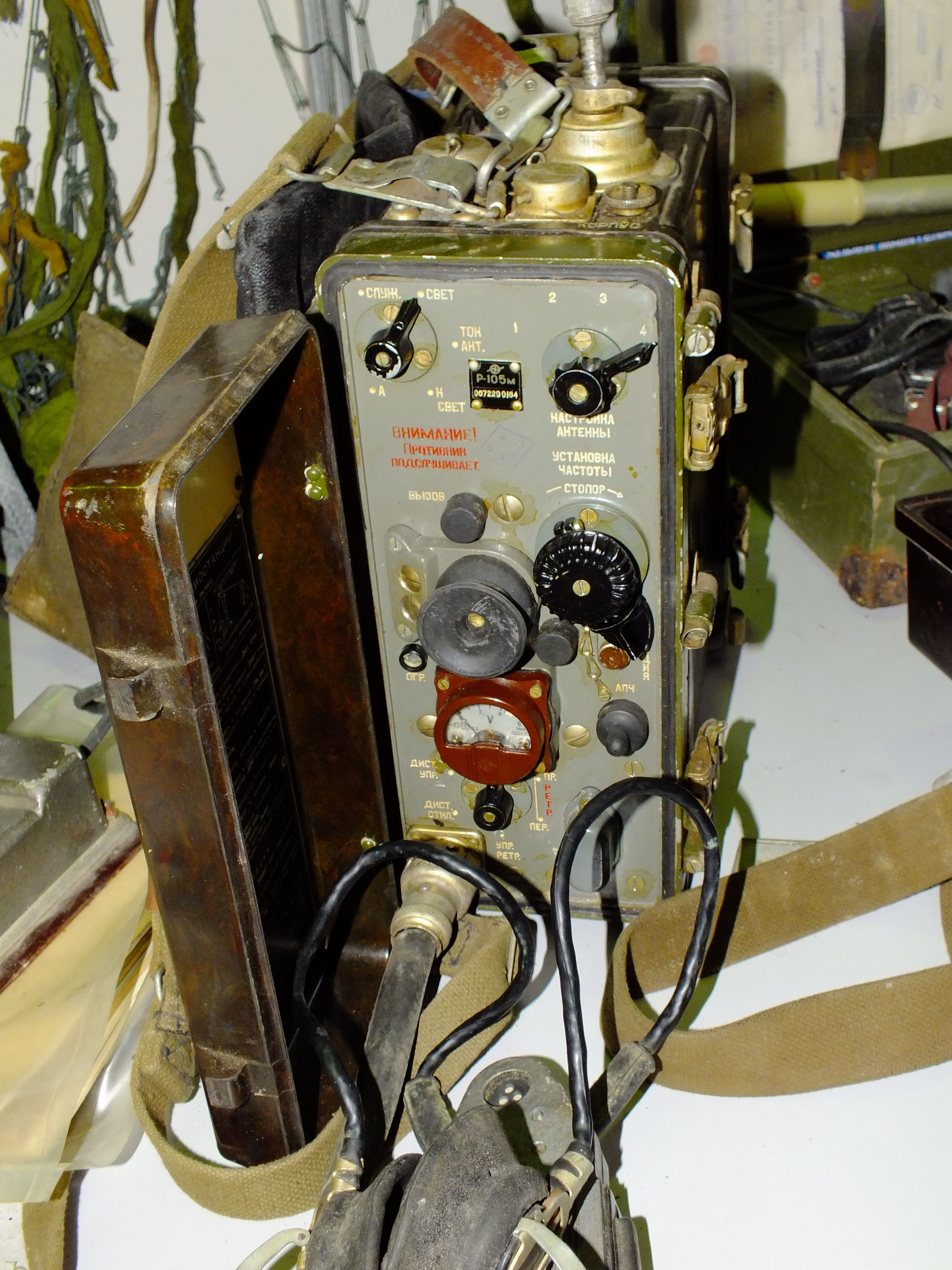 Радиостанция на выставке Хабаровск сентябрь 2015